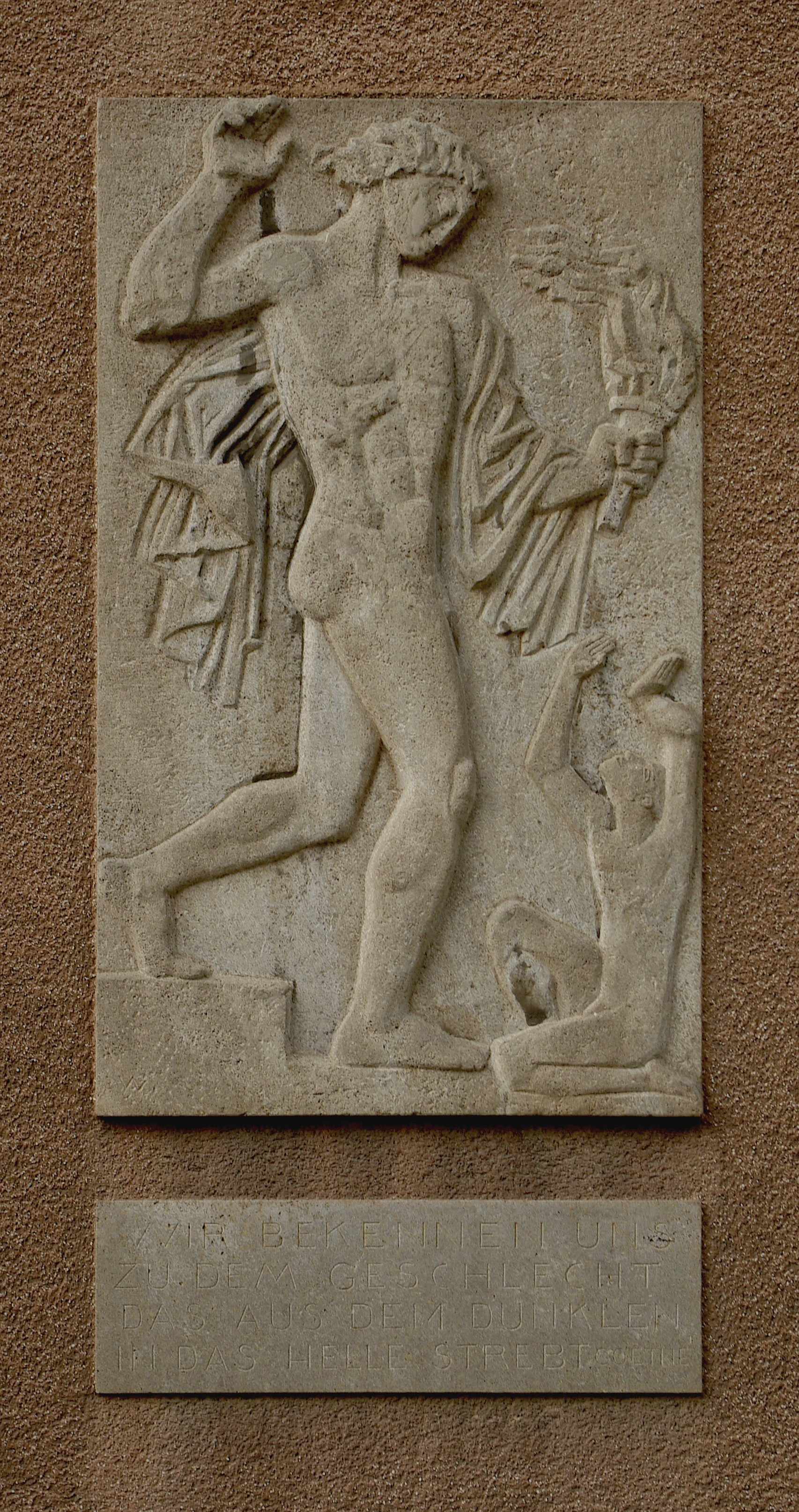 Prometheus-Relief von Joseph Wackerle, darunter das Goethe-Zitat WIR BEKENNEN UNS ZU DEM GESCHLECHT DAS AUS DEM DUNKLEN IN DAS HELLE STREBT, am Himbeerpalast in Erlangen